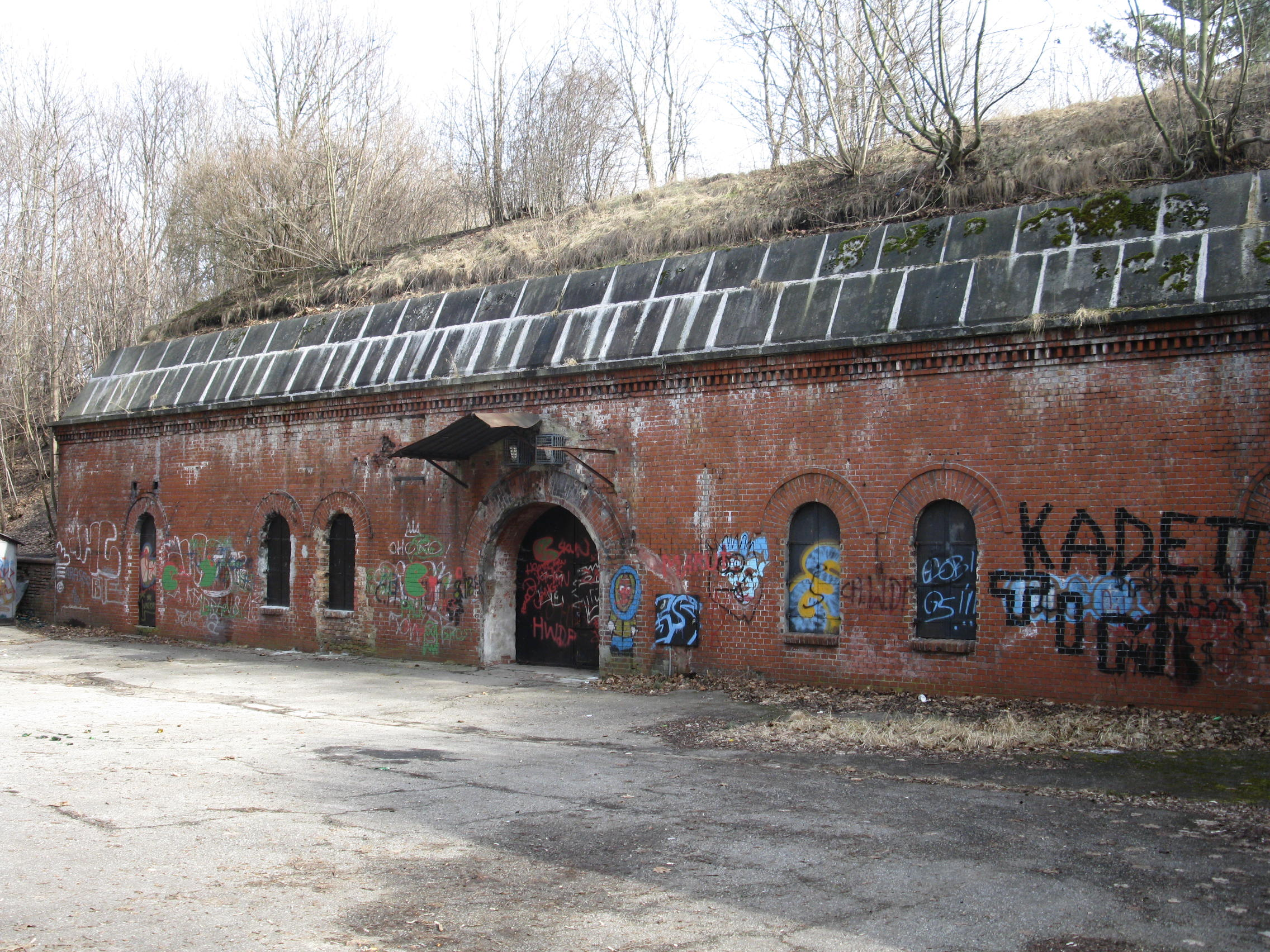 Brama główna fortu